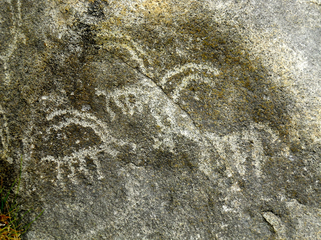 Petroglyphes à Saspol